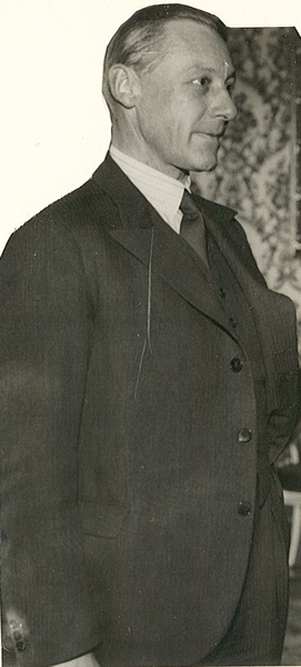 portrett, mann, direktør, idrettsutøver, stående halvfigur, halvprofil.